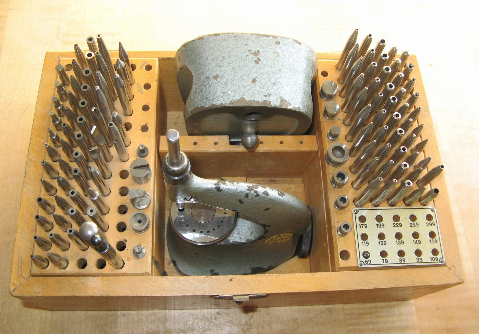 Triebnietmaschine